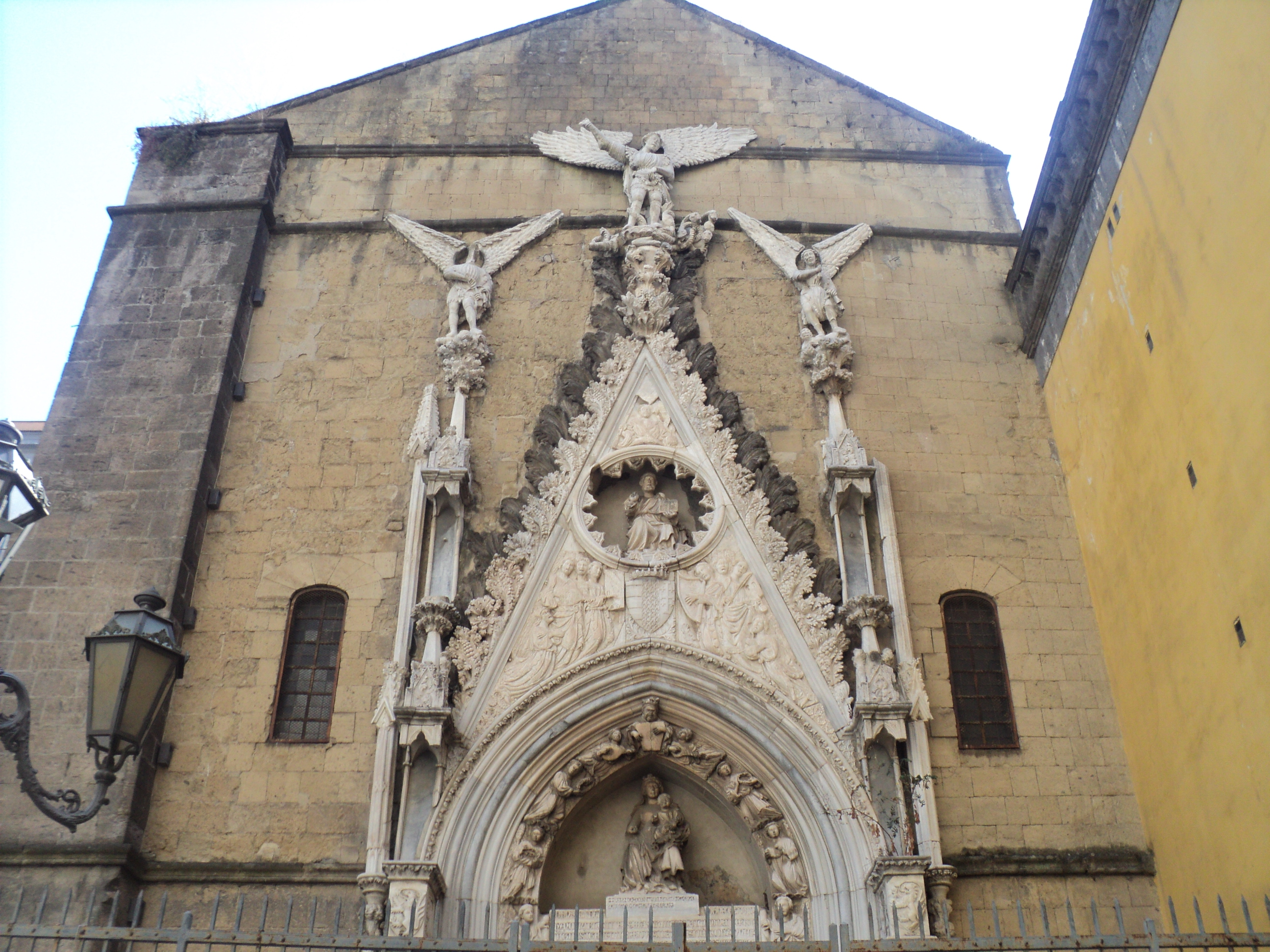 Chiesa (o Cappella) dei Pappacoda (particolare della scultura marmorea di Baboccio da Piperno)